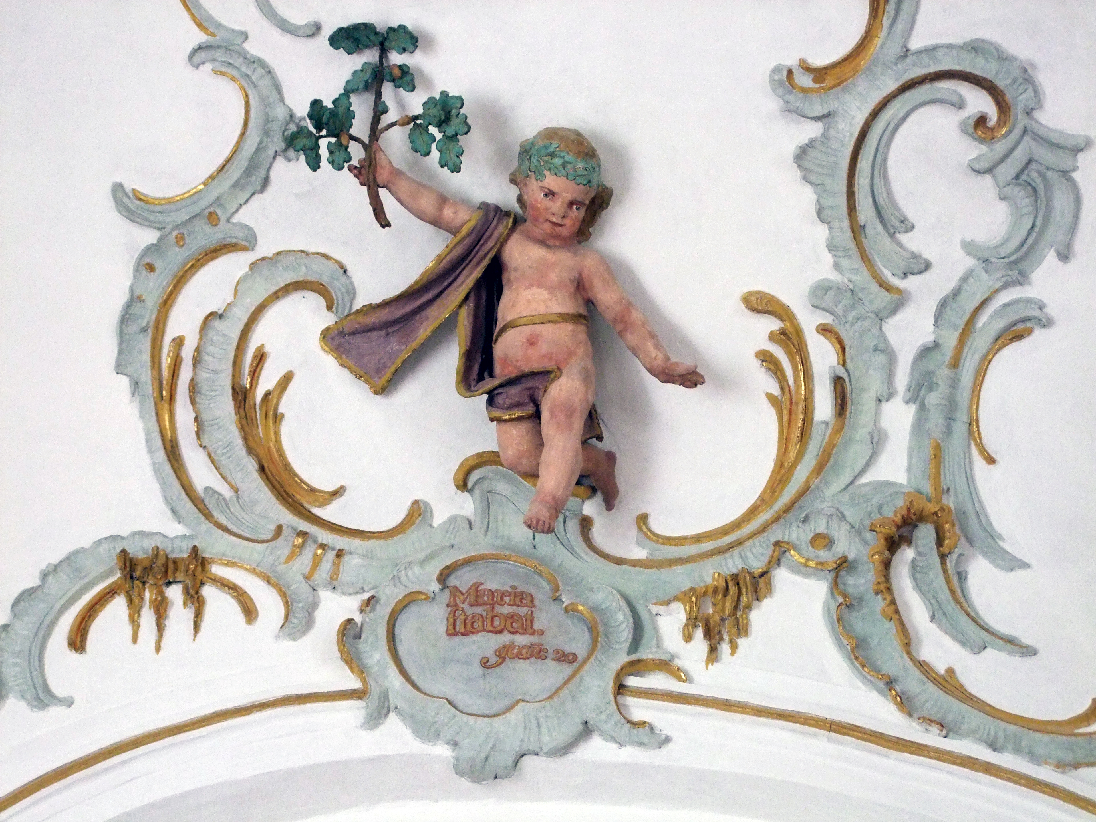 Wallfahrtskirche "Unserer lieben Frau vom Berge Karmel" im oberschwäbischen Mussenhausen, Gemeindeteil Markt Rettenbachs bei Memmingen. Stuckputto an der Decke der Kirche